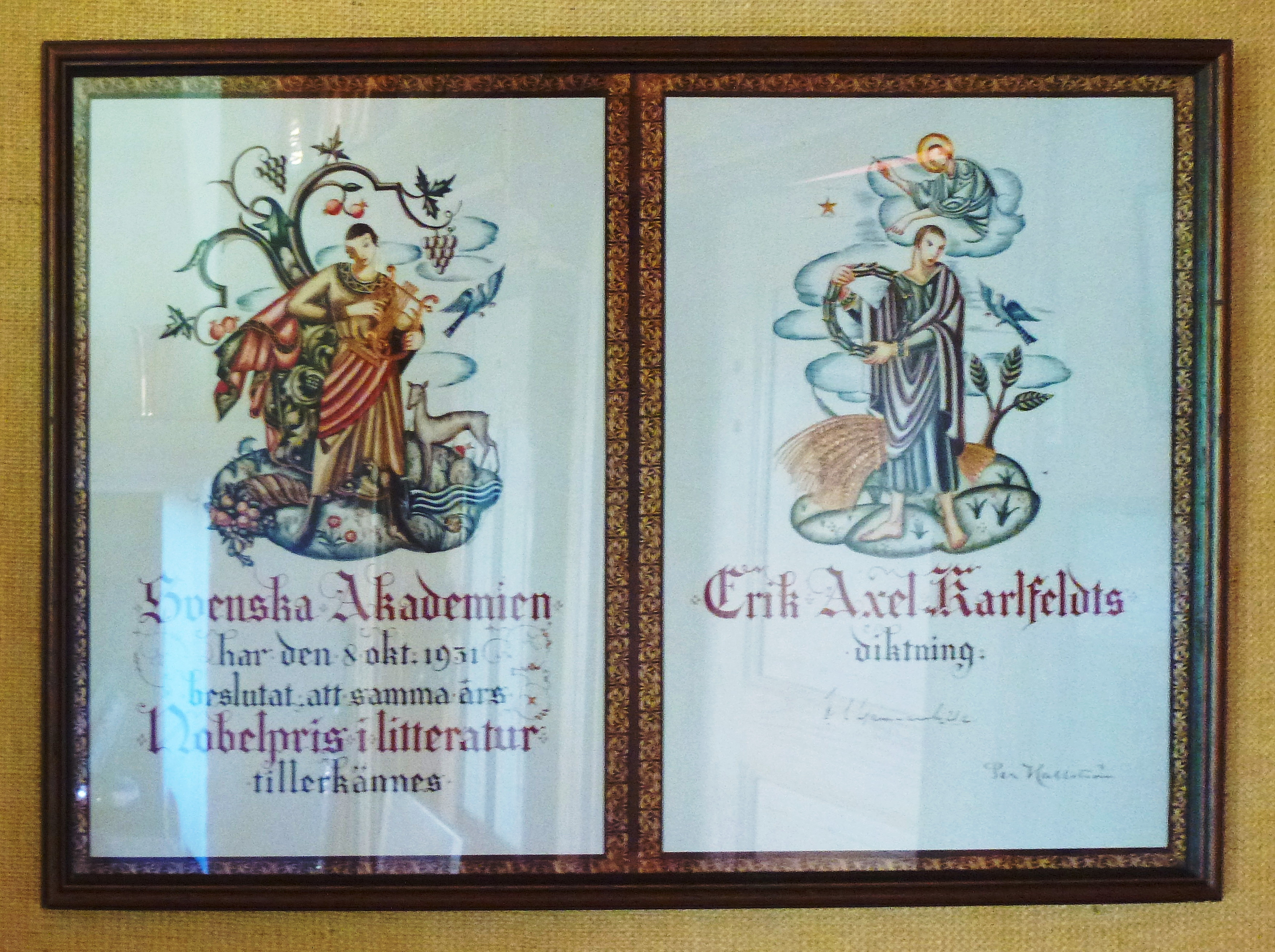 Nobelpris i litteratur 1931, Diplom utställt i Karlfeldts arbetsrum på Karlfeldtsgården Sångs